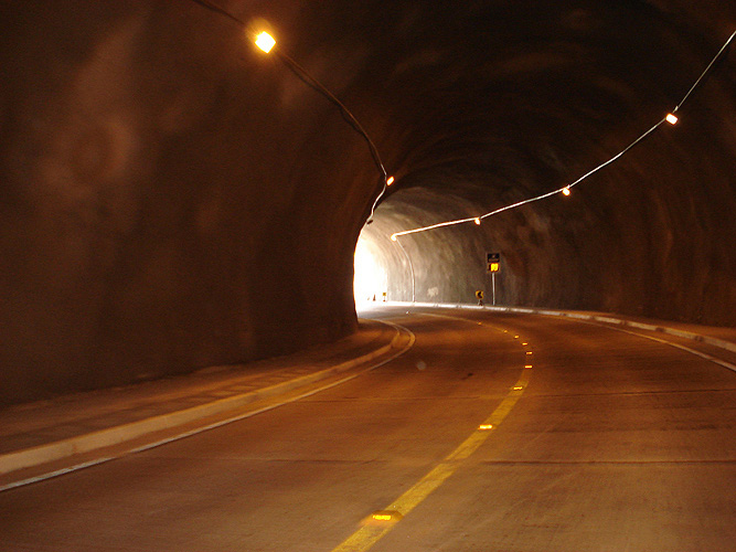 Túnel rodoviário na estrada Rota do Sol, Rio Grande do Sul, Brasil.